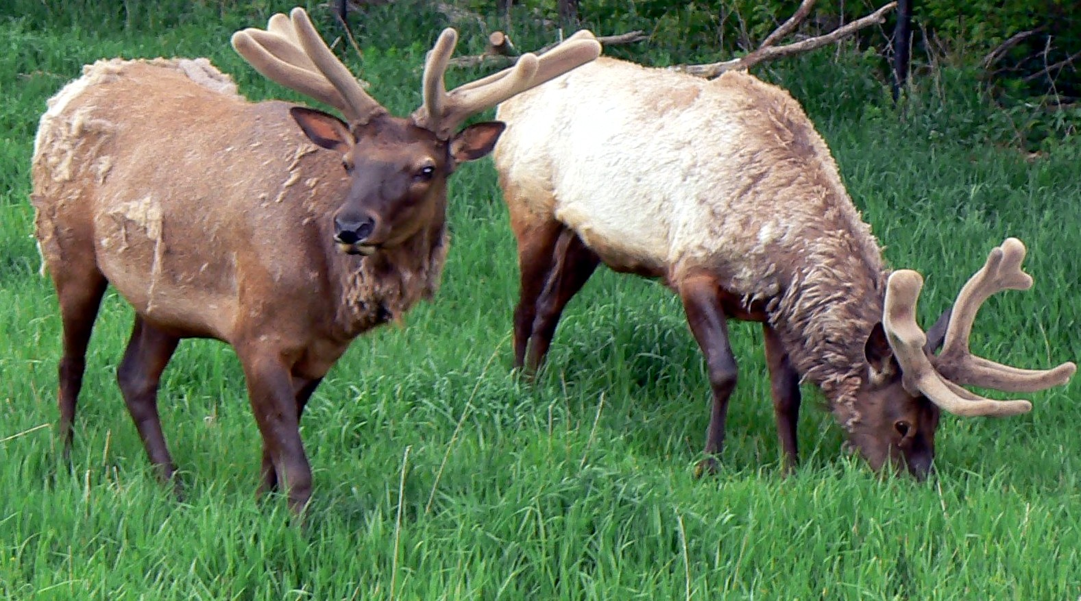 Rocky Mountain Elk in Nebraska.